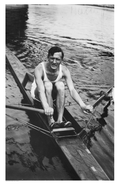 Włodzimierz Długoszewski (zawodnik Oddziału Wioślarskiego Sokoła Krakowskiego) podczas Mistrzostw Europy w Wioślarstwie w Bydgoszczy - 1929